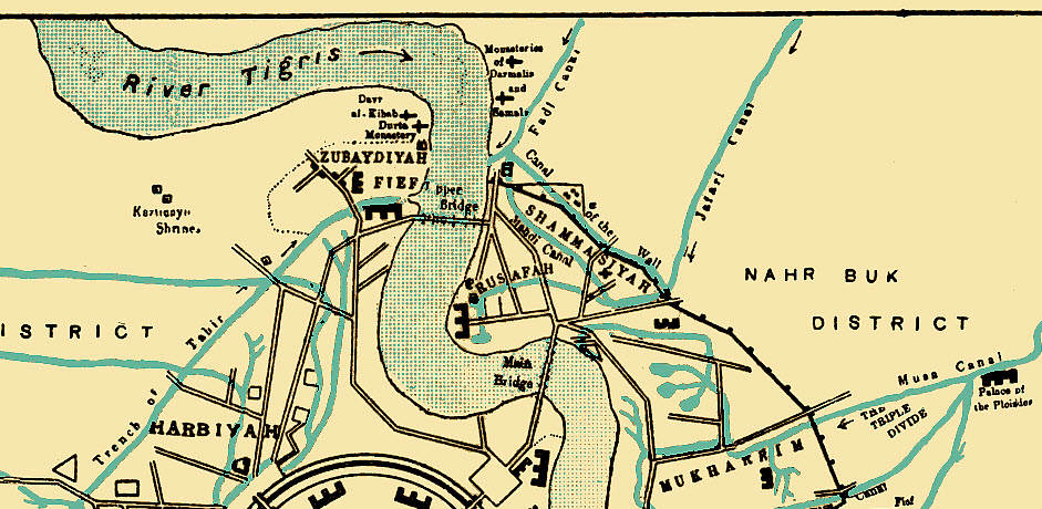 جزء من خارطة بغداد، مقتبسة من ويكيميديا